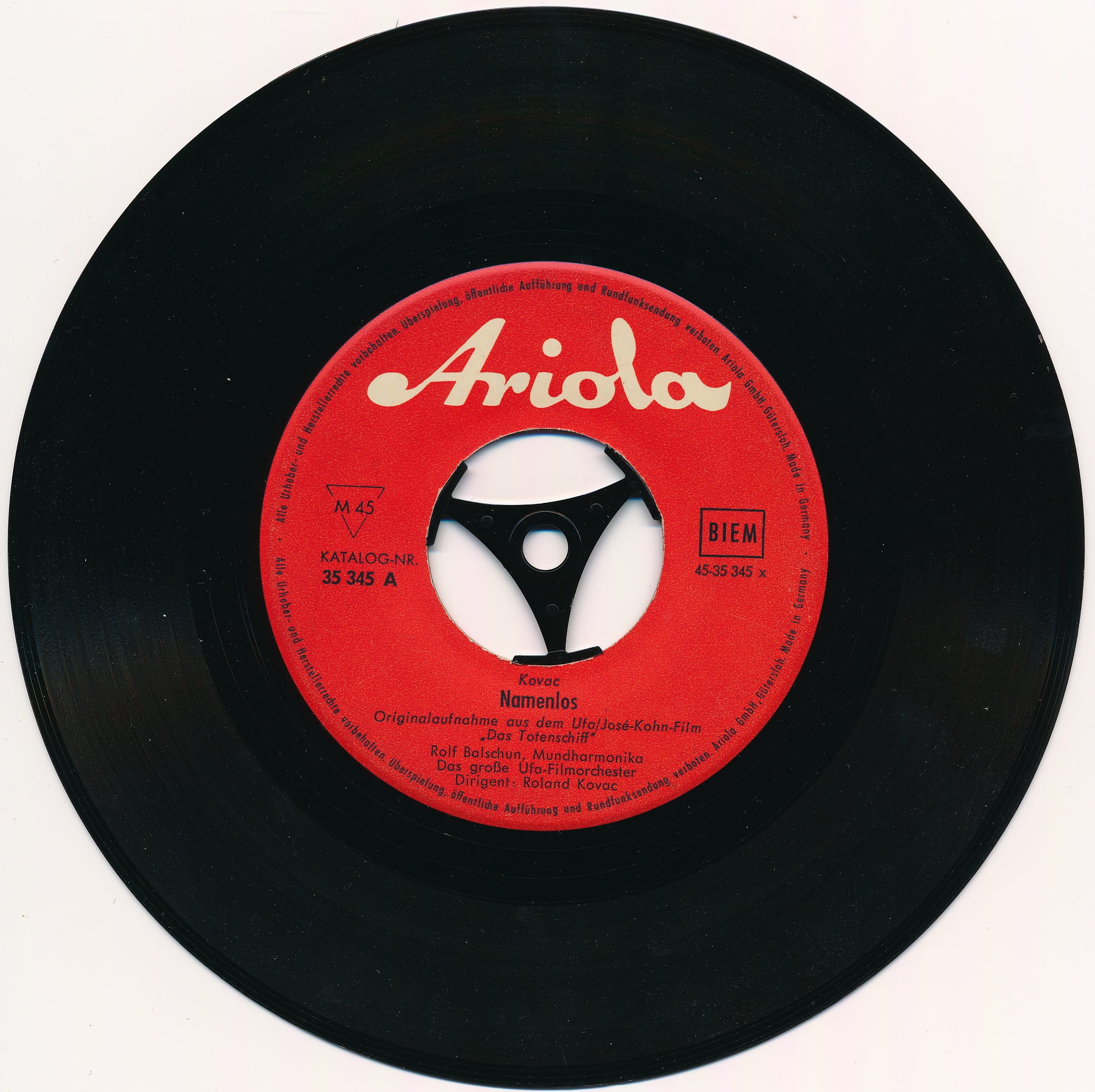 Ariola Single-Schallplatte 1958 bis 1967